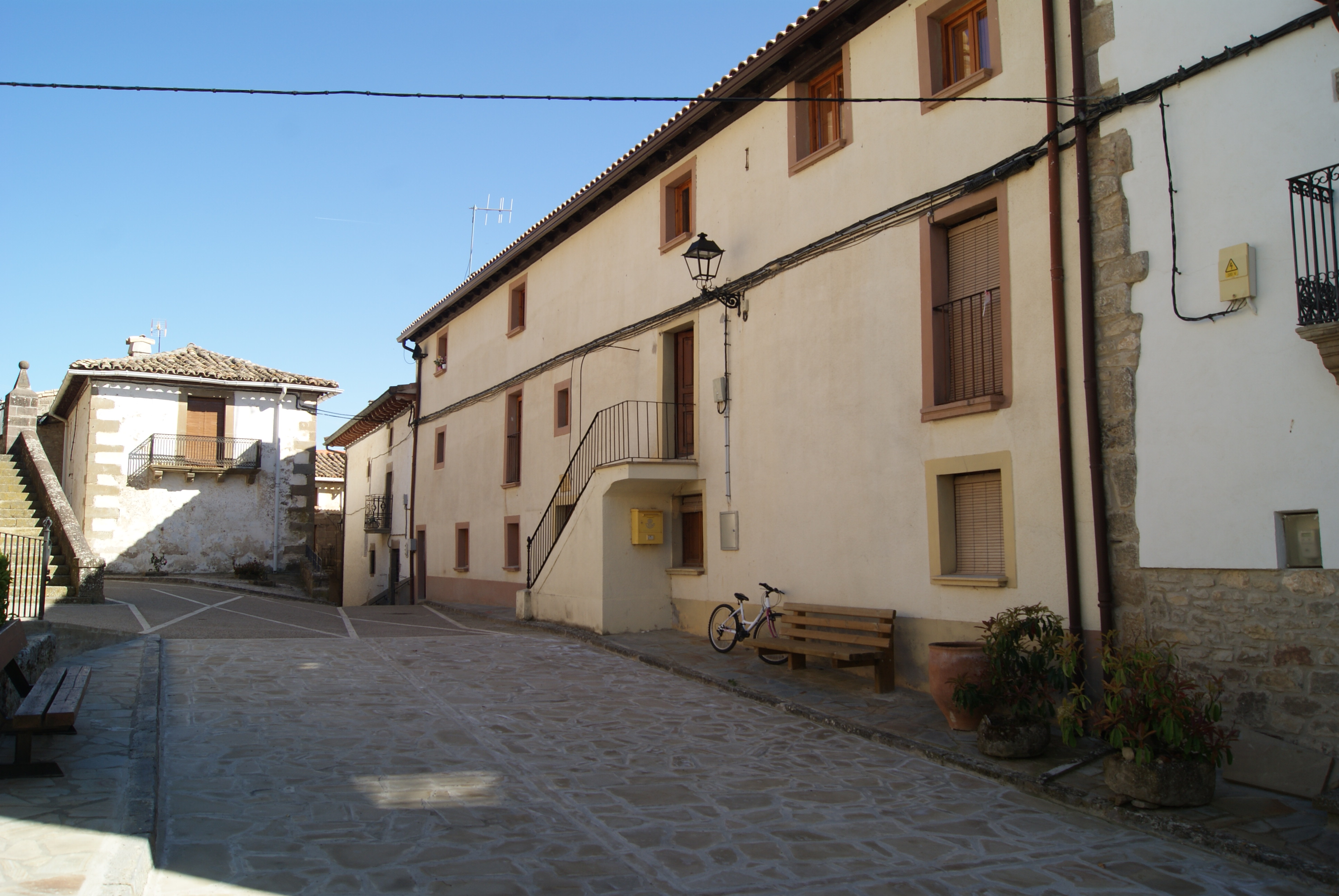 Urriés (Zaragoza) - Fachada del ayuntamiento